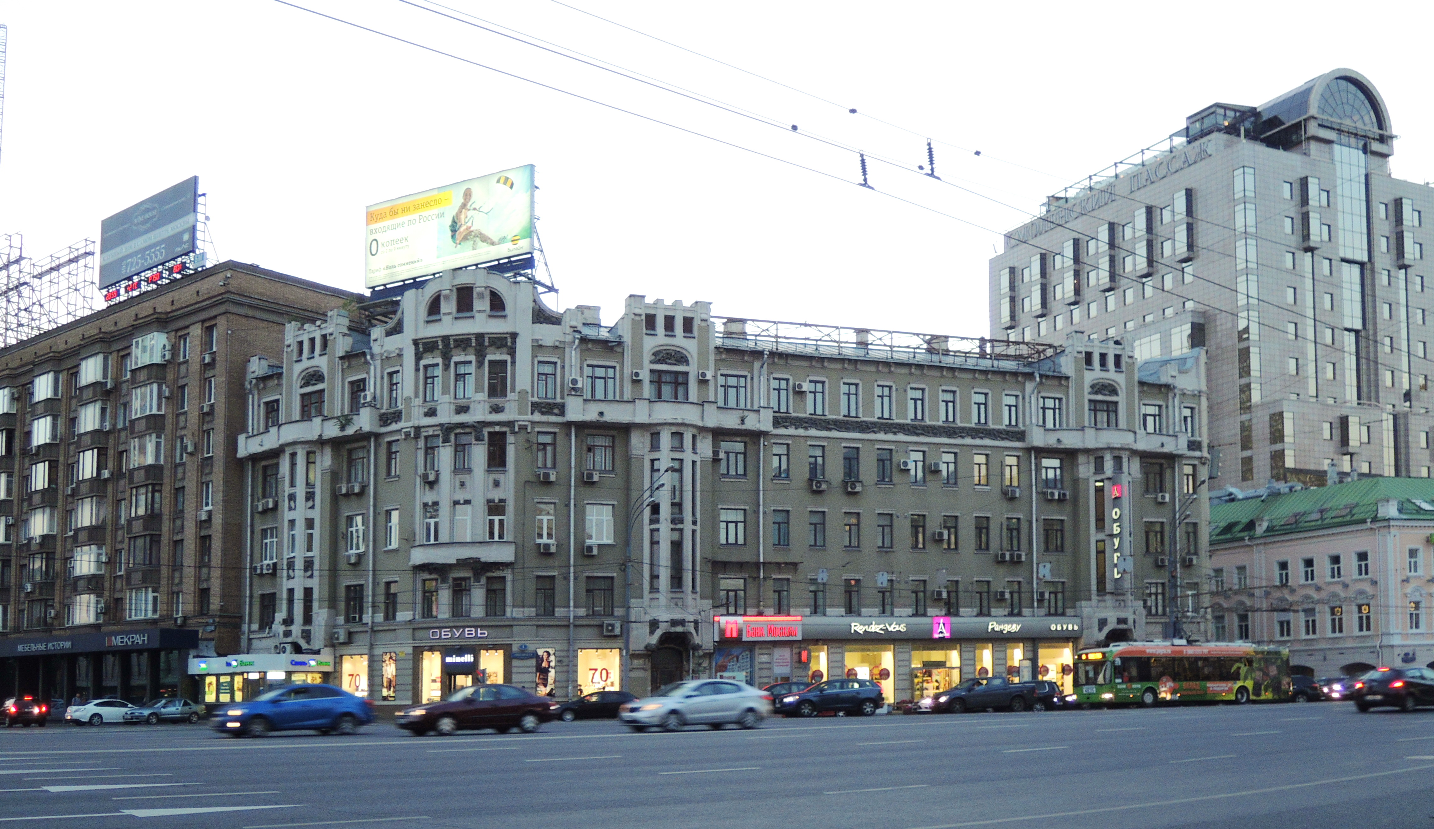 2-й Смоленский пер., 1/4, Смоленская-Сенная площадь